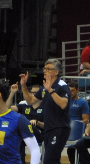 Zdjęcie zrobione podczas Memoriału Huberta Jerzego Wagnera 2019